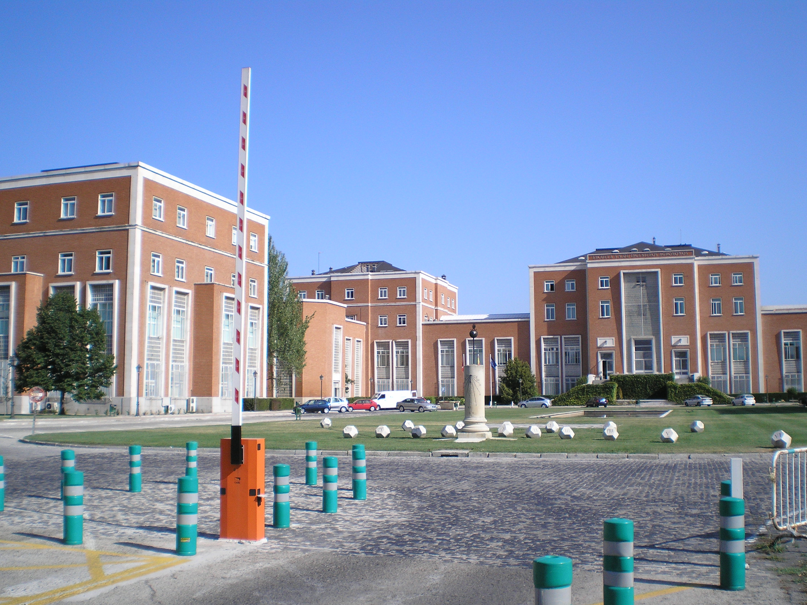 Escuela Técnica Superior de Ingenieros Agrónomos, Universidad Politécnica de Madrid, España.